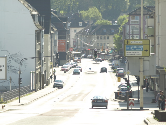 Blick über DEN Ostersbaum von der Kreuzung Rudolfstraße/Schwesterstraße bis zur Einmüdung Engelnberg